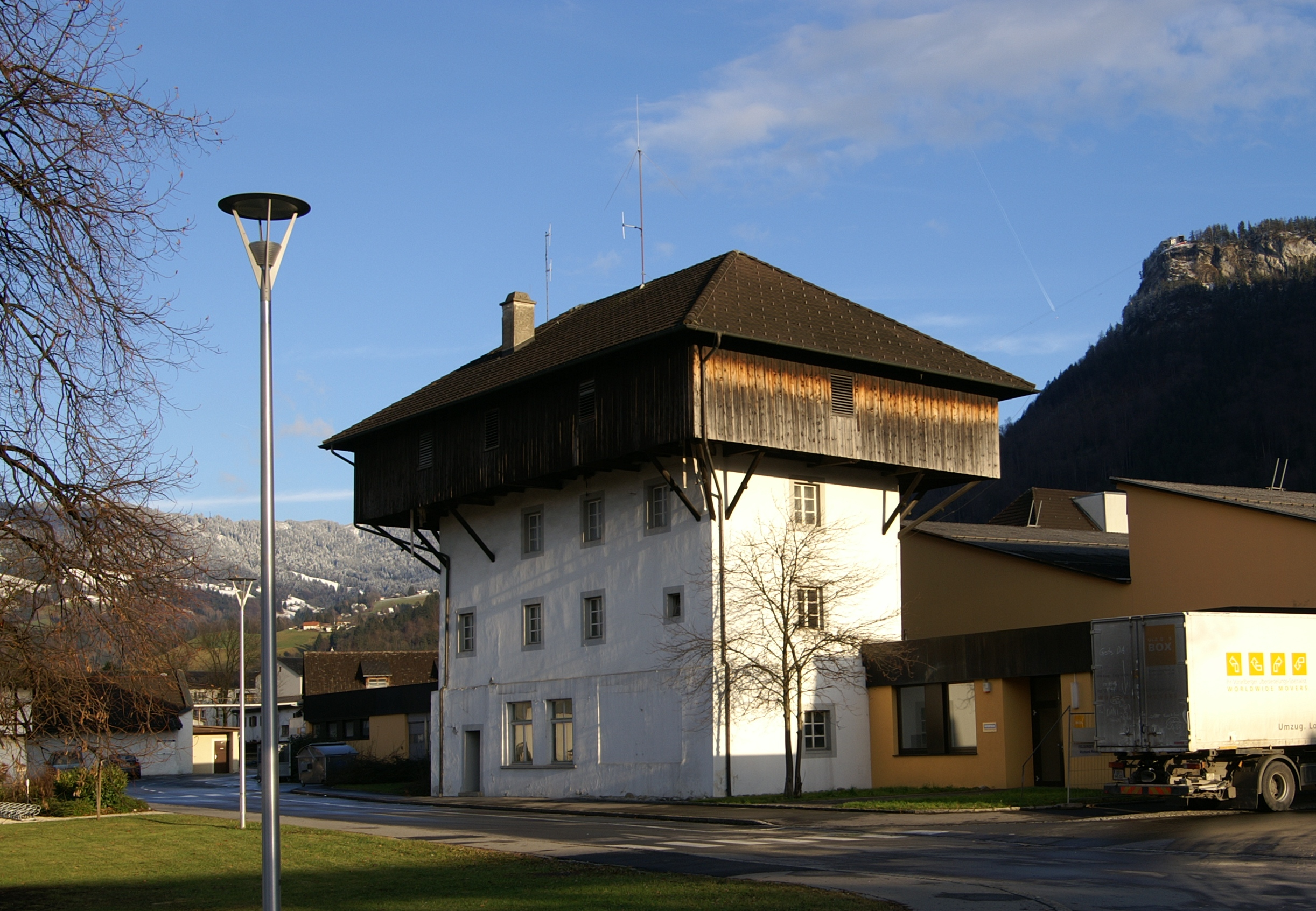 Beschreibung: Trockenturm der Firma IM Fussenegger Textilfabrik erbaut 1896